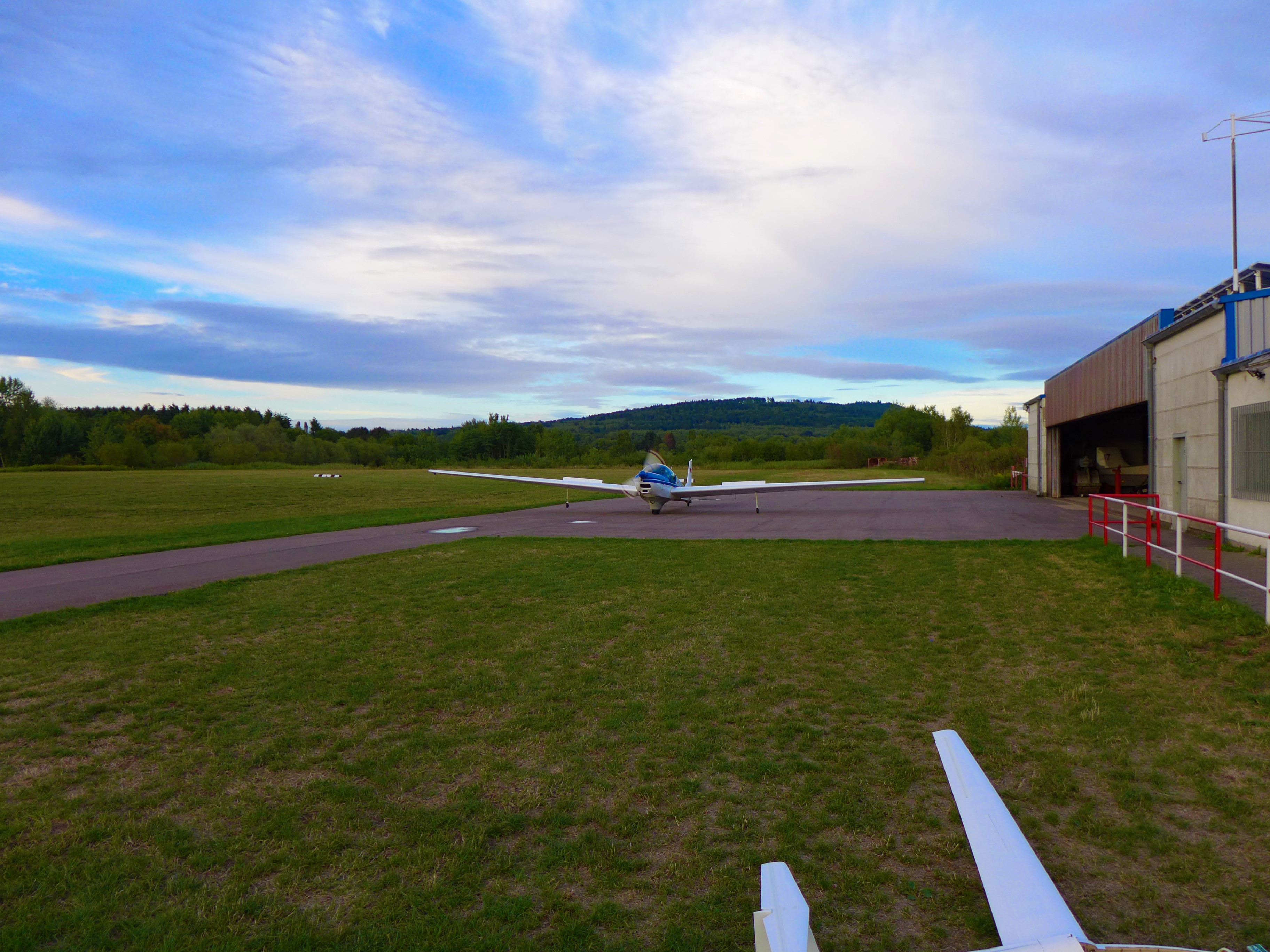 Diefflen, Segelflugplatz, Gelandetes Flugzeug vor dem Hangar